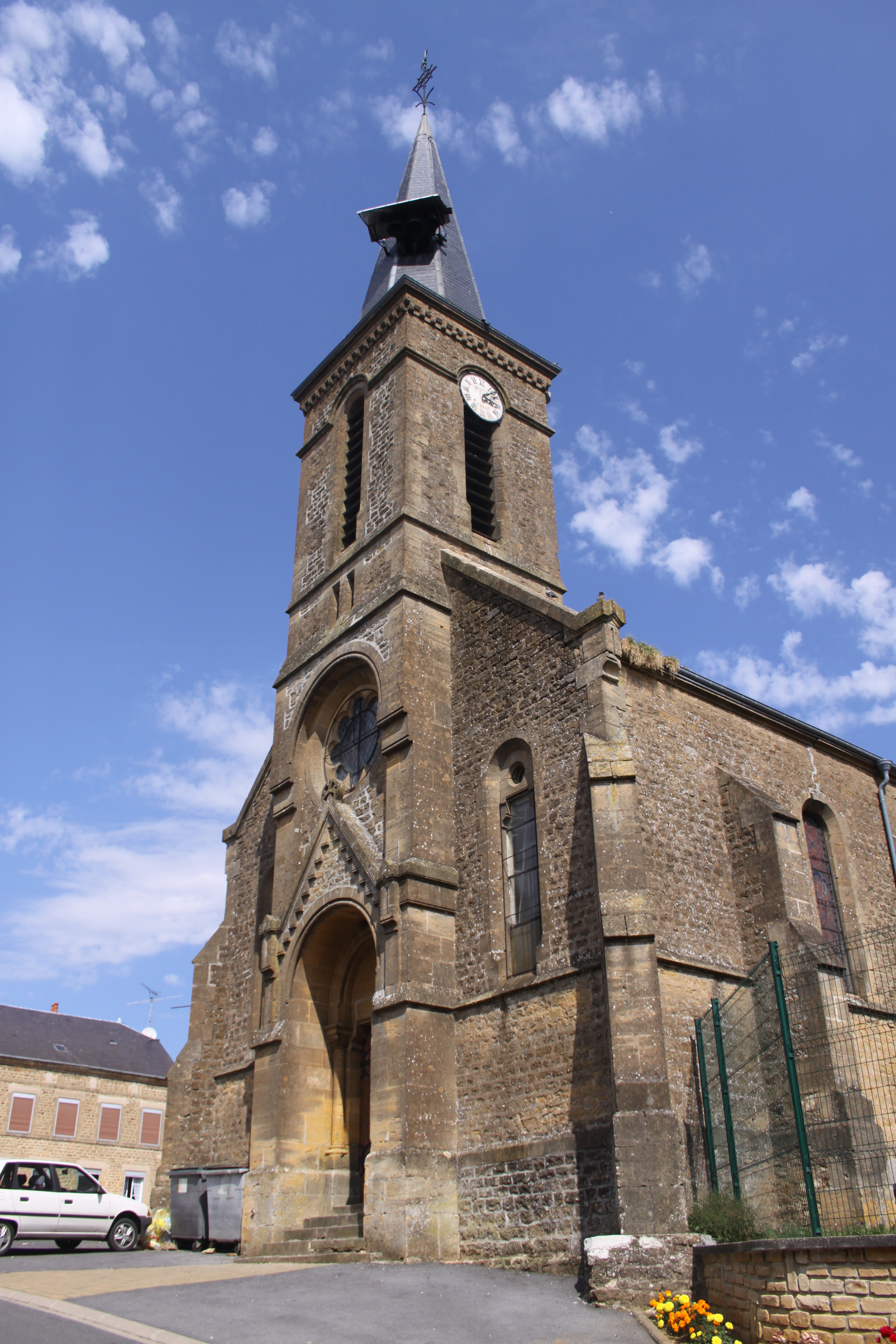 Village Ardennais